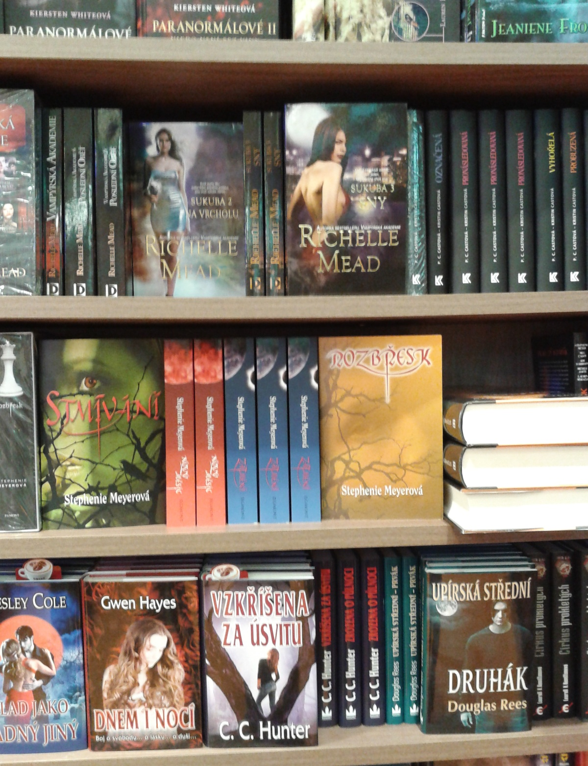 Regál Fantasy v nejmenovaném pražském knihkupectví.